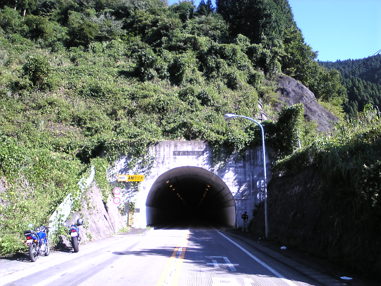 甲武トンネル